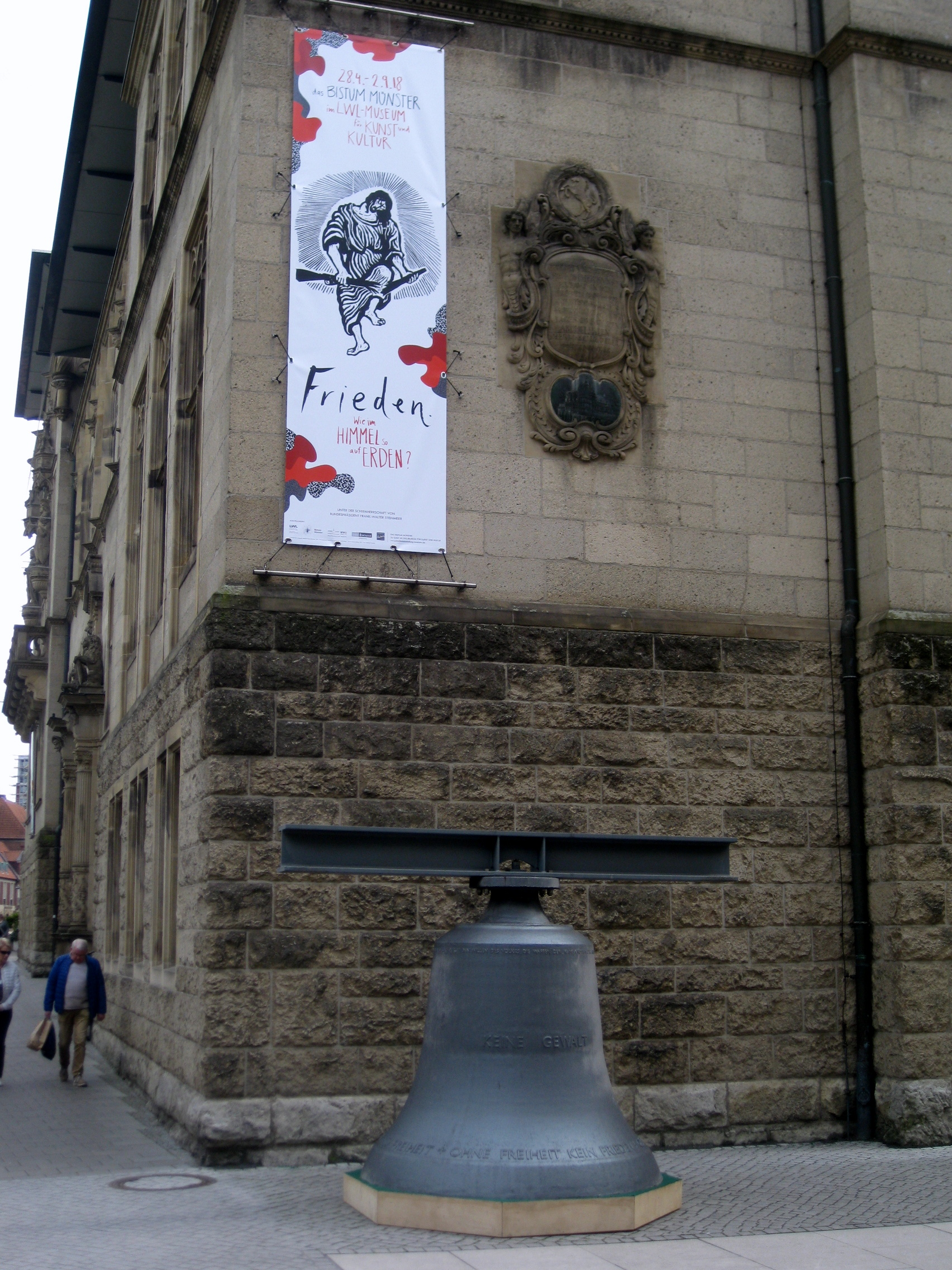 Ausstellung der Friedensglocke Dessau im Eingangsbereich des LWL Museums Münster anläßlich der Ausstellung "Frieden" vom 28.4 - 2.9.2018